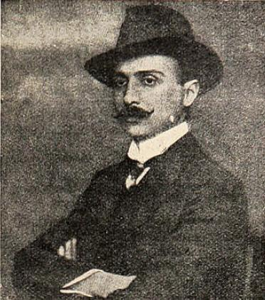 José Luis Sánchez Besa (Santiago, Chile, 13 de febrero de 1879 - París, Francia, 2 de marzo de 1955) fue un abogado, piloto civil, diseñador y constructor de aviones. Se convirtió, en 1909 y junto a Emilio Edwards Bello, en el primer chileno en despegar en un avión.